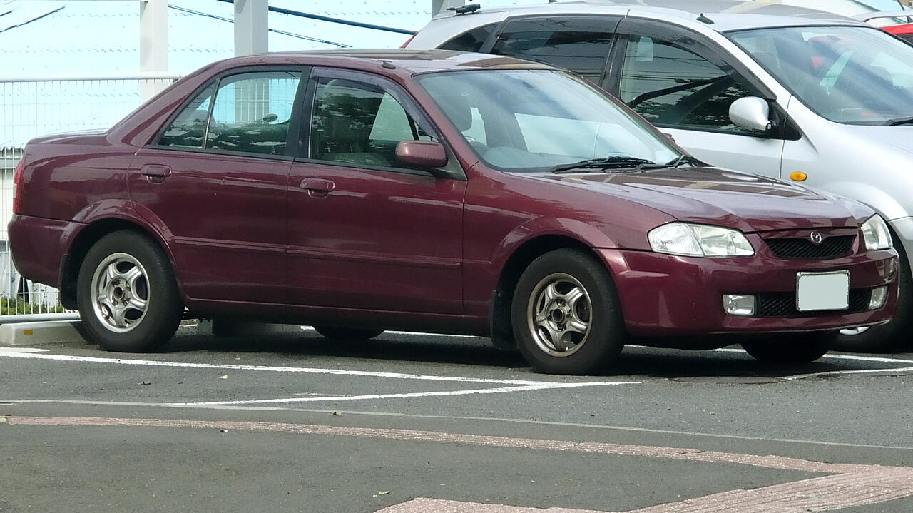 9代目マツダ･ファミリアセダン